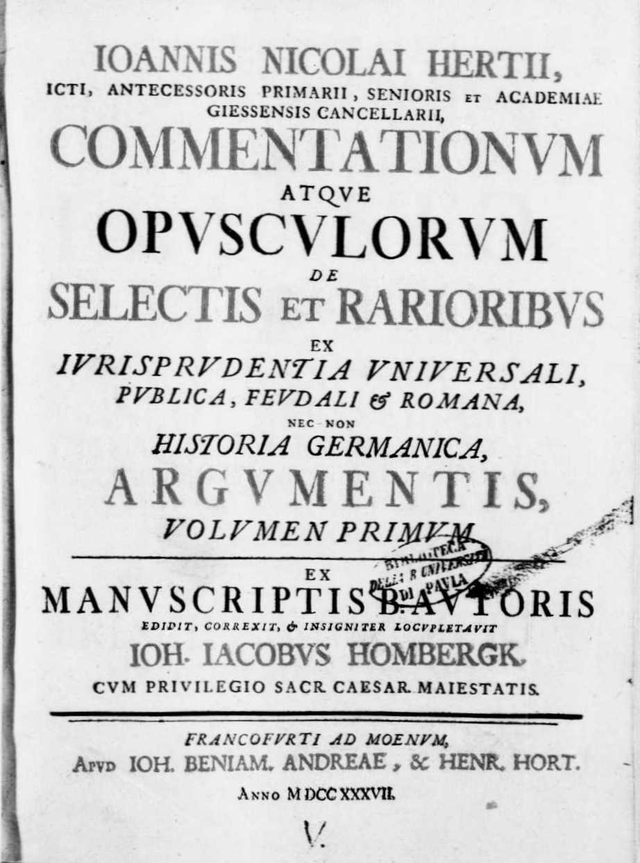 Frontespizio